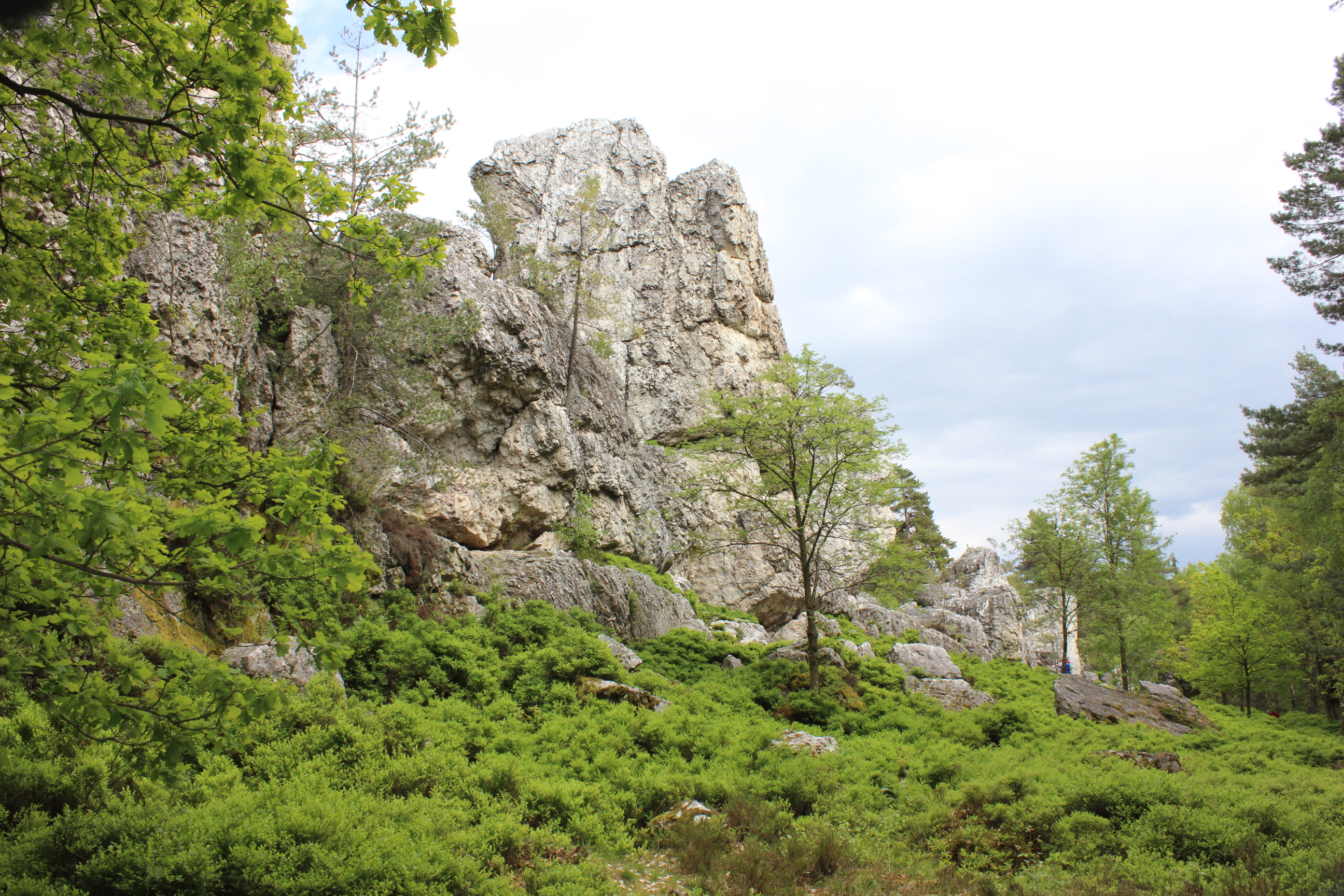 Geotop im Landkreis Regen: Großer Pfahl - Nordwestteil; Kennung Nr. 276R018.